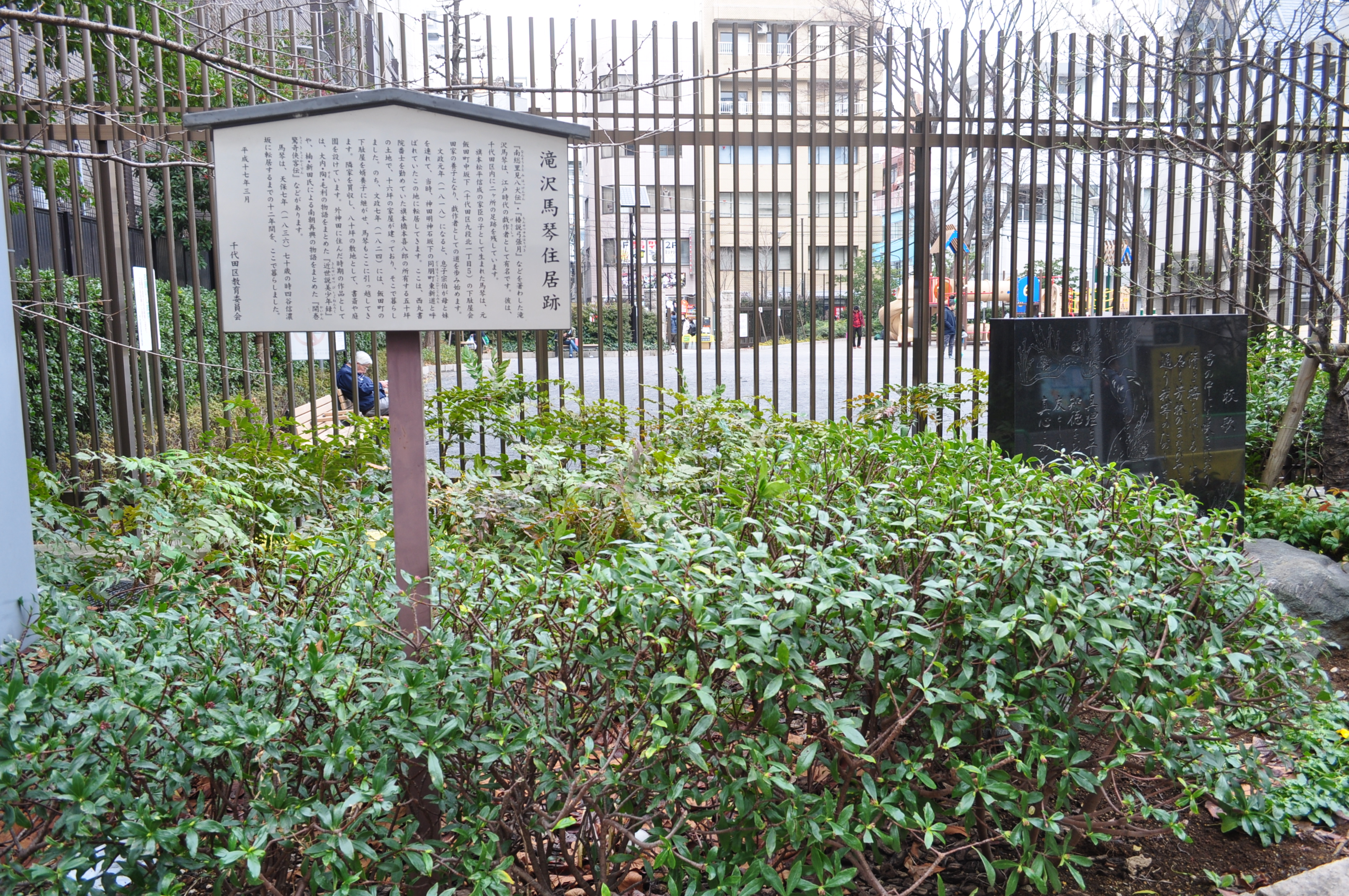 外神田にある滝沢馬琴居住跡の案内 Nikon D5000